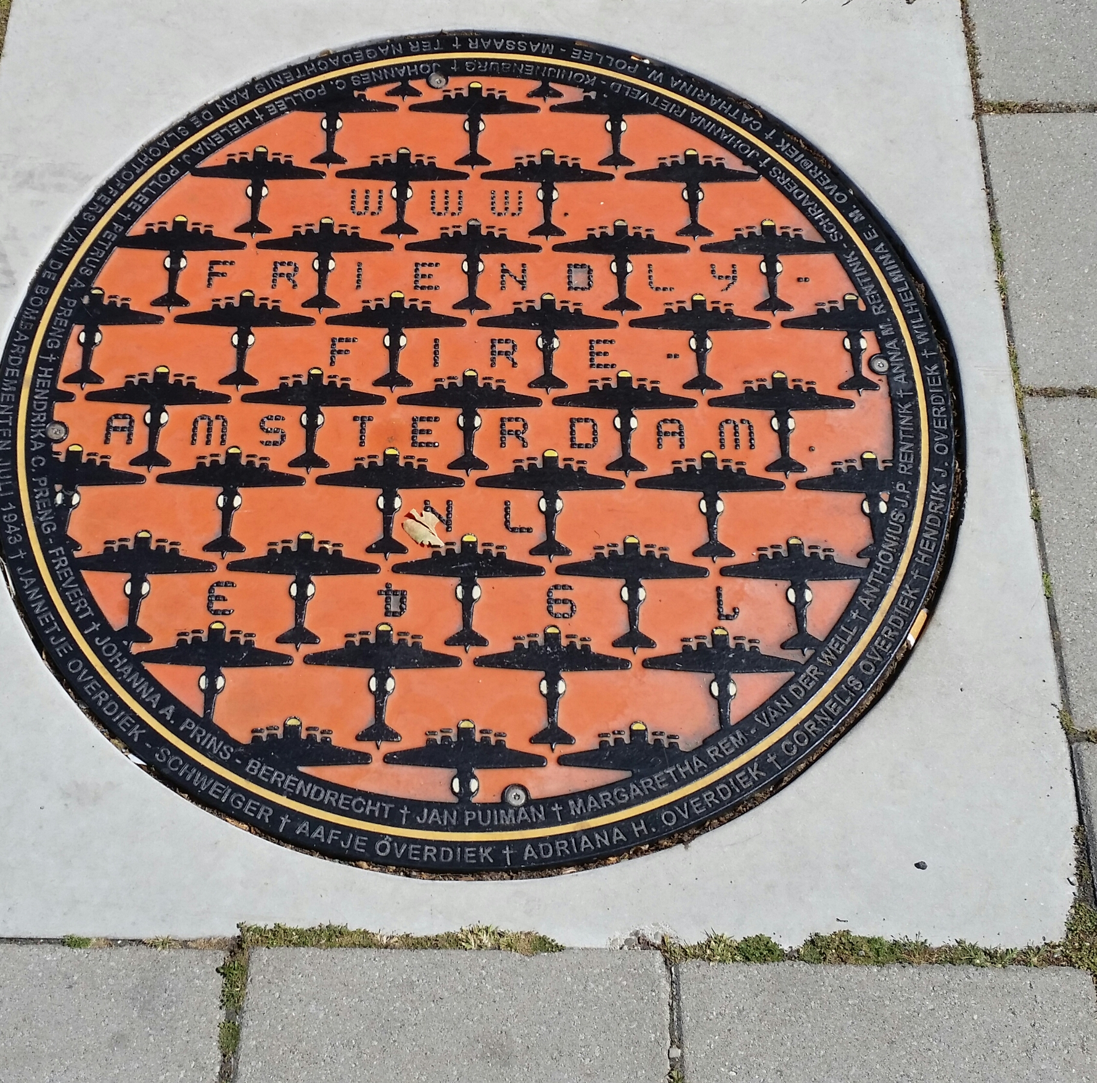 Impressie van het Kraaienplein, Amsterdam-Noord (mei 2020)